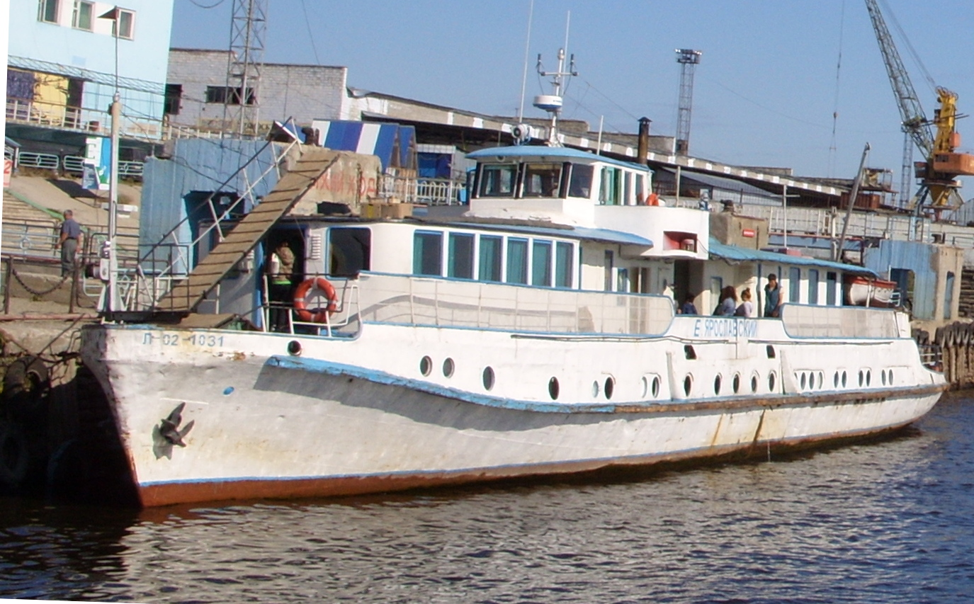 Hafen Jakutsk, Schiff Yemelyan Yaroslavskiy der Serie Turgenjew - Edgar Andre Schiffswerft Magdeburg